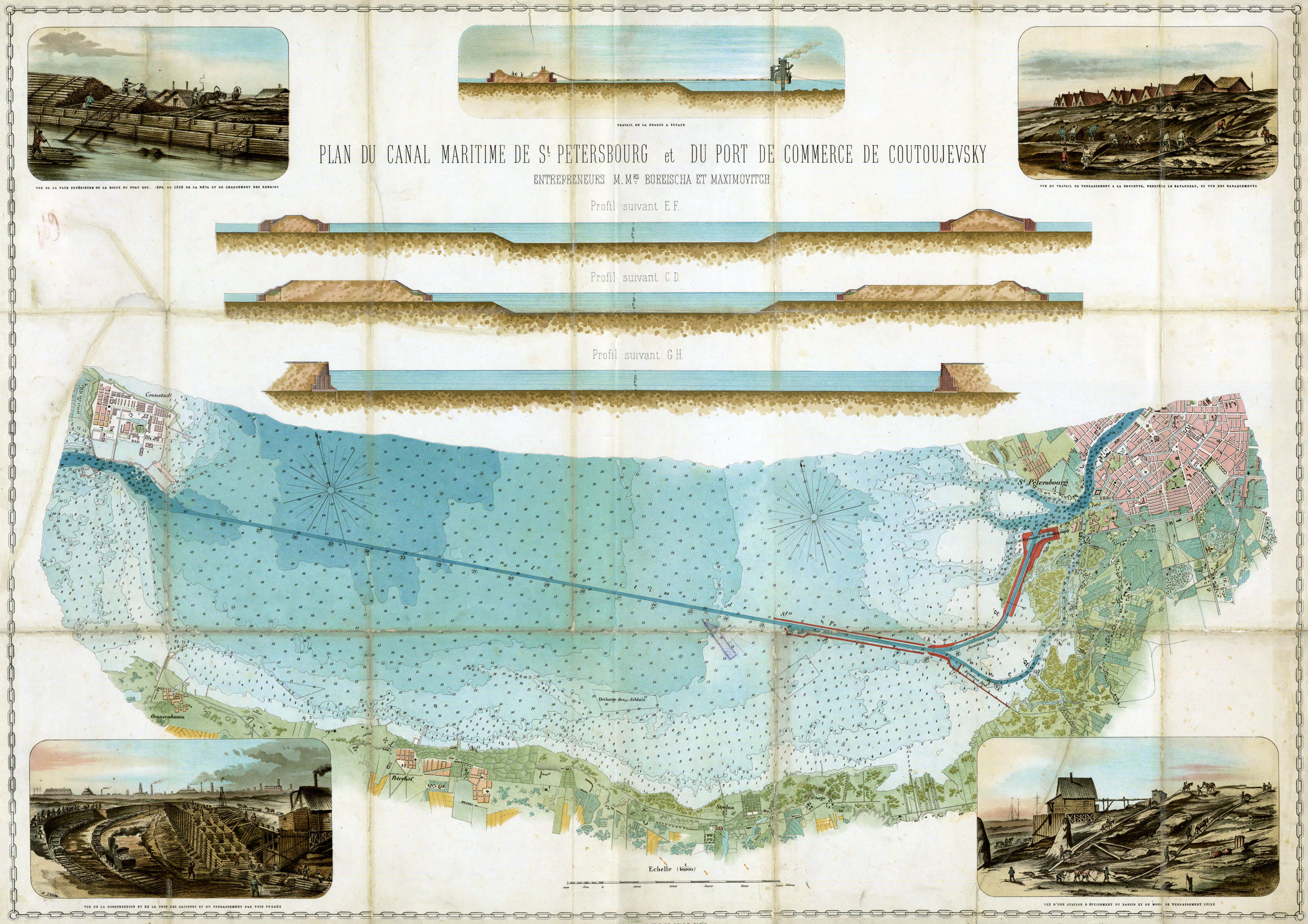 Карта Морского канала Санкт-Петербурга на французском языке. Изображены план и профиль канала, а также рисунки показывающие ход строительных работ